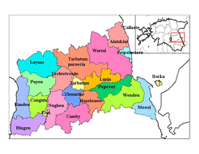 Tarbati municipia Latine